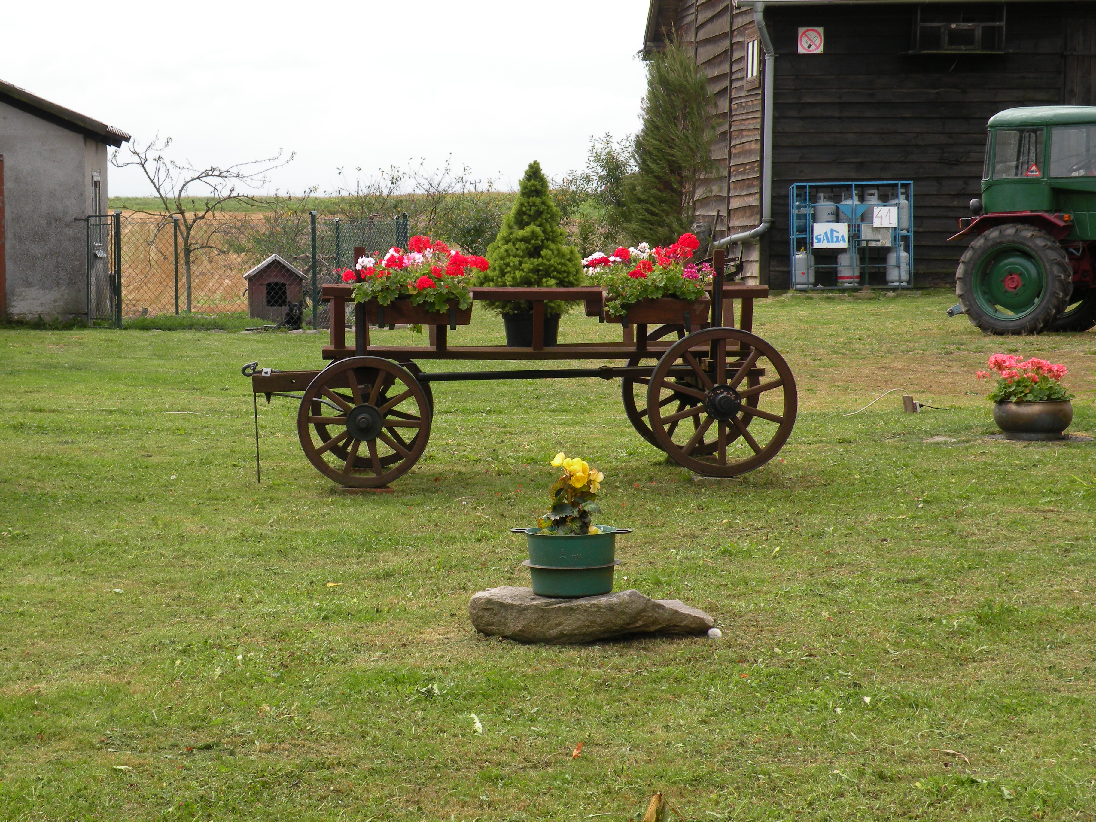 Gady, podwórze wiejskie z dekoracjami